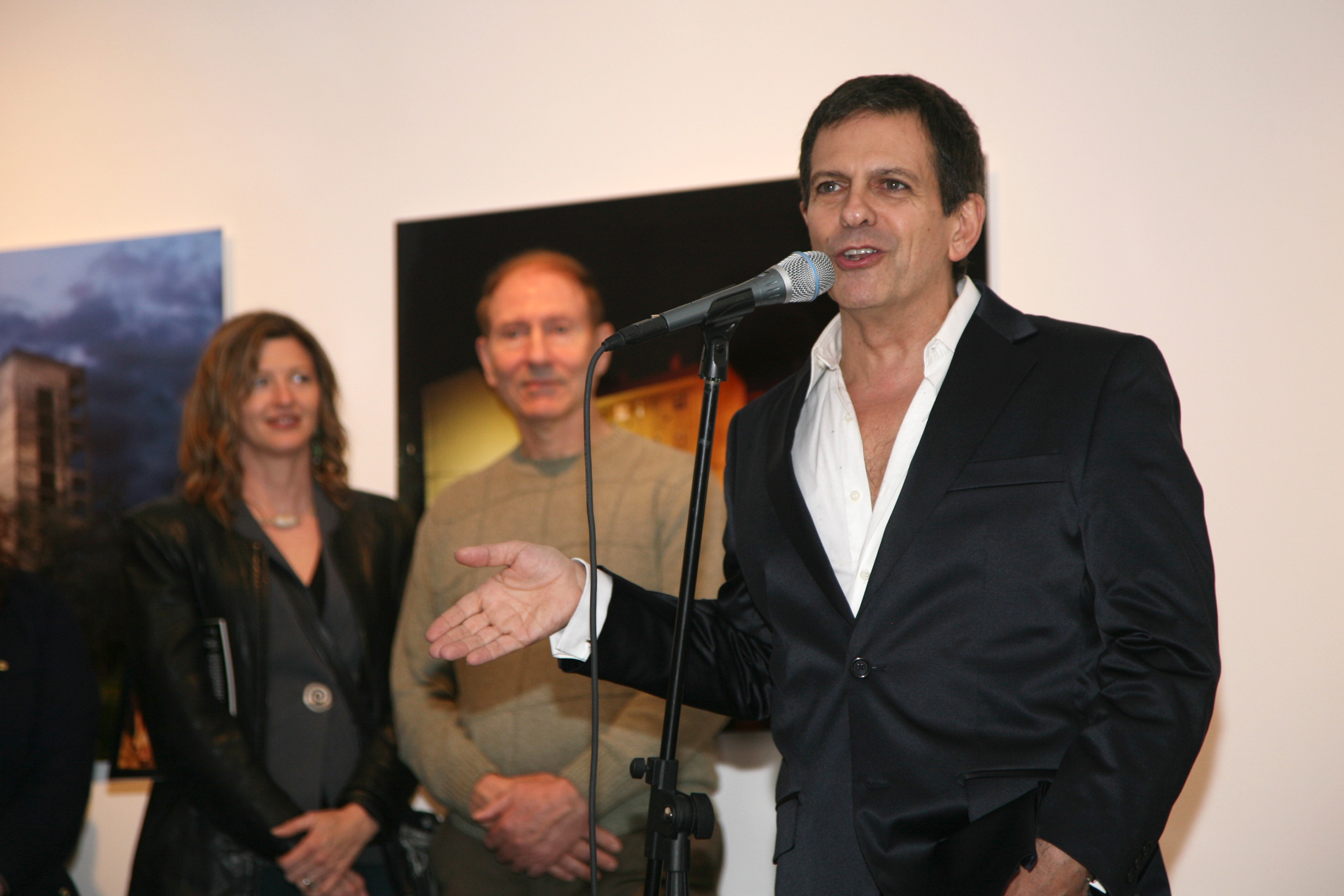 El tanguero Guillermito Fernández habla en el Museo de Arte de las Américas, en la ciudad de Washington DC, 3 de abril de 2014.